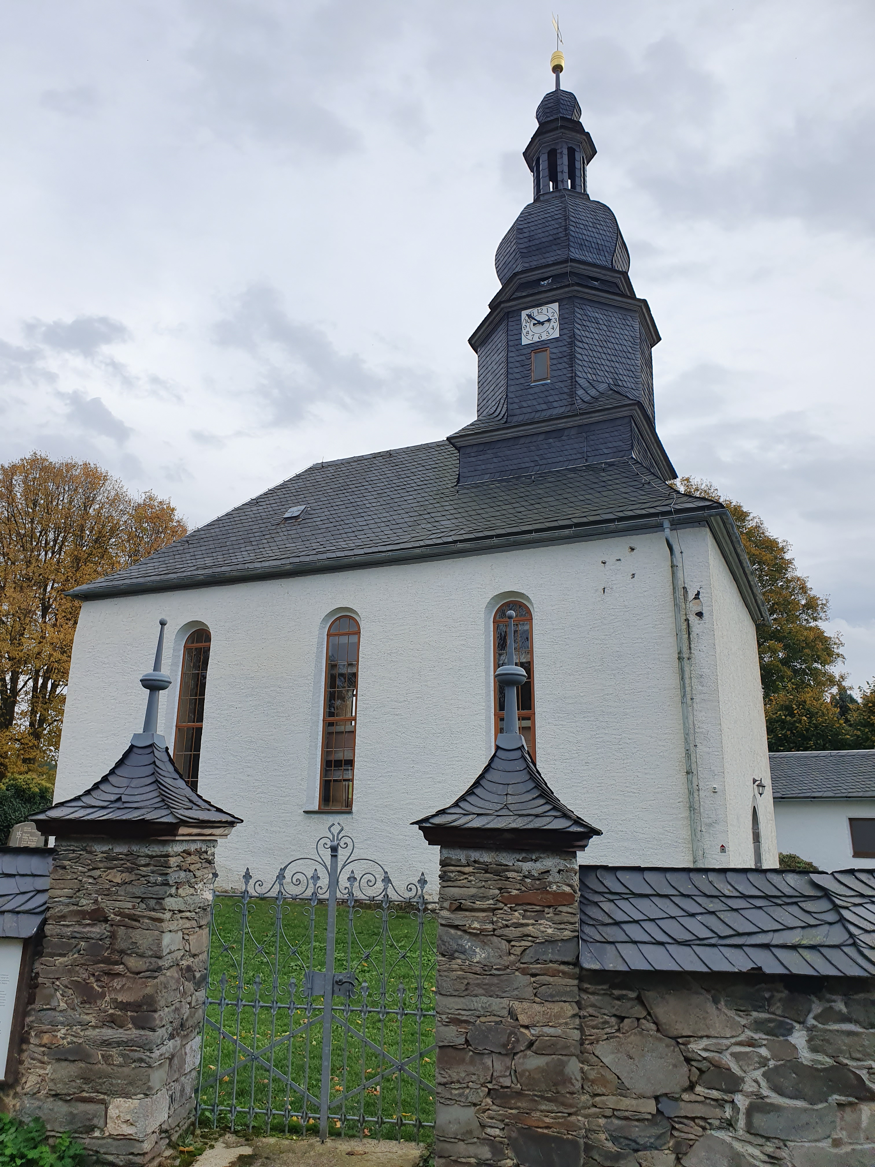 Kirche von Altengesees in Thüringen